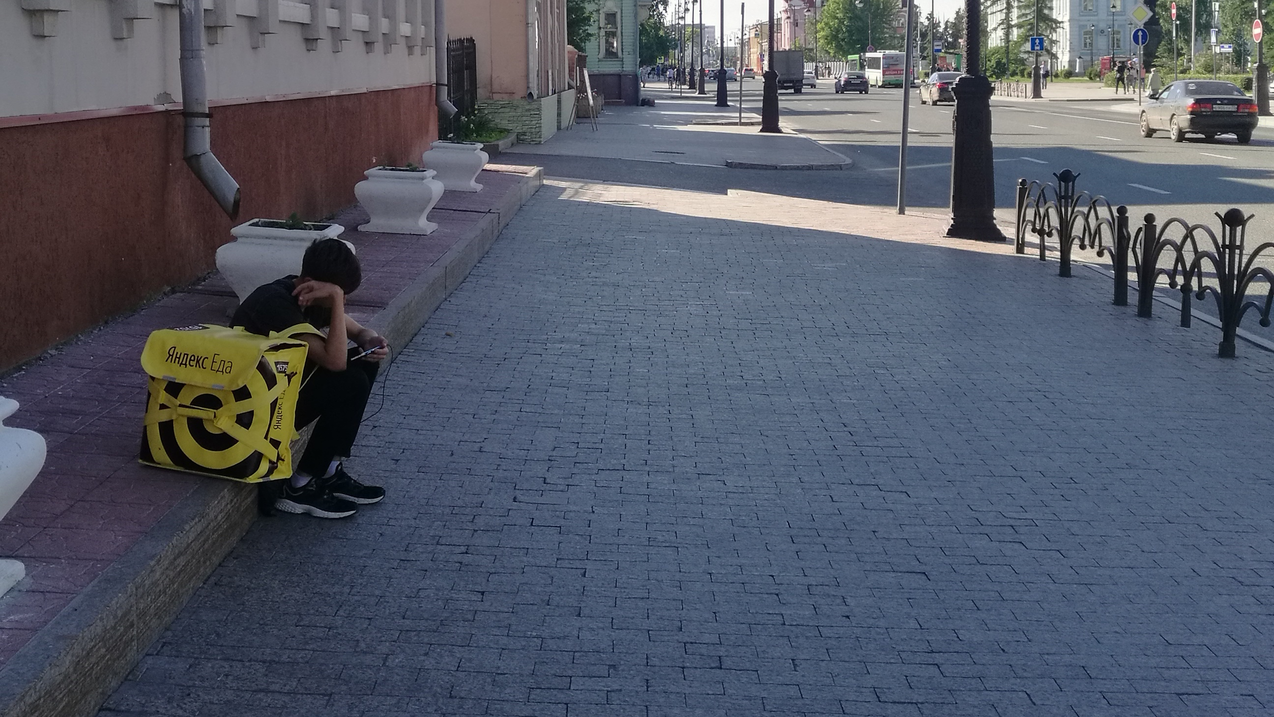 Kuriero de servo Yandex Manĝaĵoj. Tjumeno, Rusio.